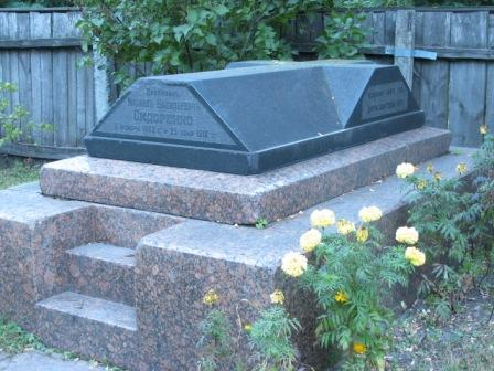 Могила поміщика Сидоренка на території Михайлівської церкви в селі Безуглівка, Ніжинського району, Чернігівської області, Україна.